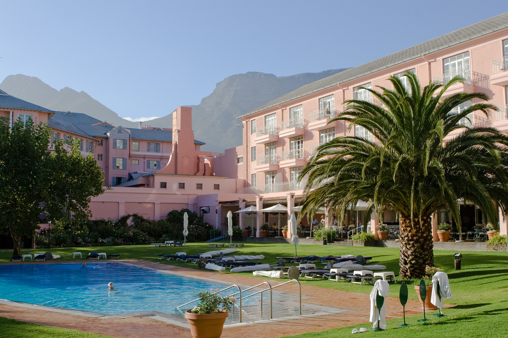 Mount Nelson Hotel